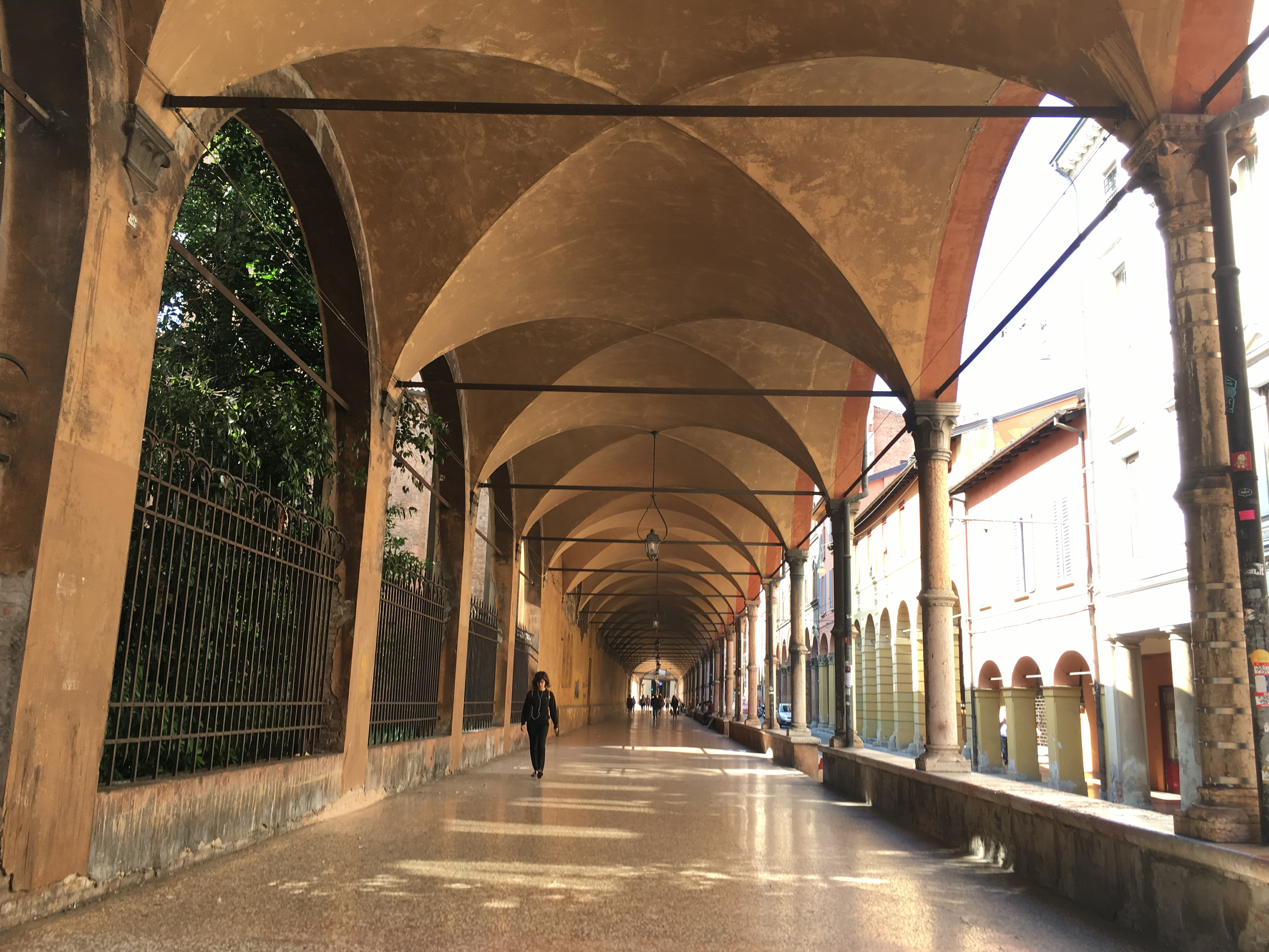 Portico di Santa Maria dei Servi This is a photo of a monument which is part of cultural heritage of Italy.